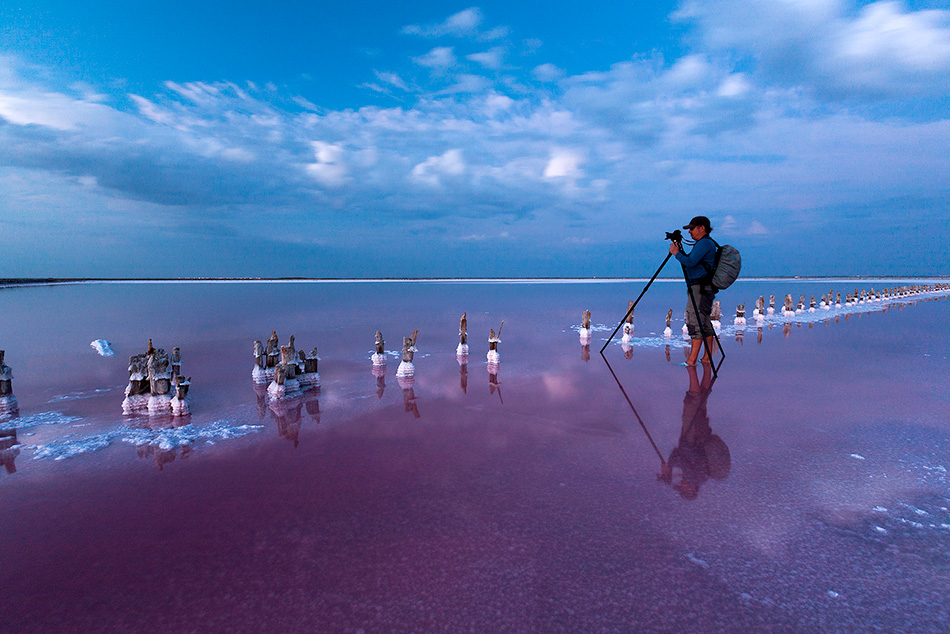 оз.Сасык, Евпатория